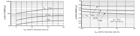 Voltaje en el capacitor, voltaje en el cátodo y voltaje en la compuerta cuando el dispositivo esta en funcionamiento